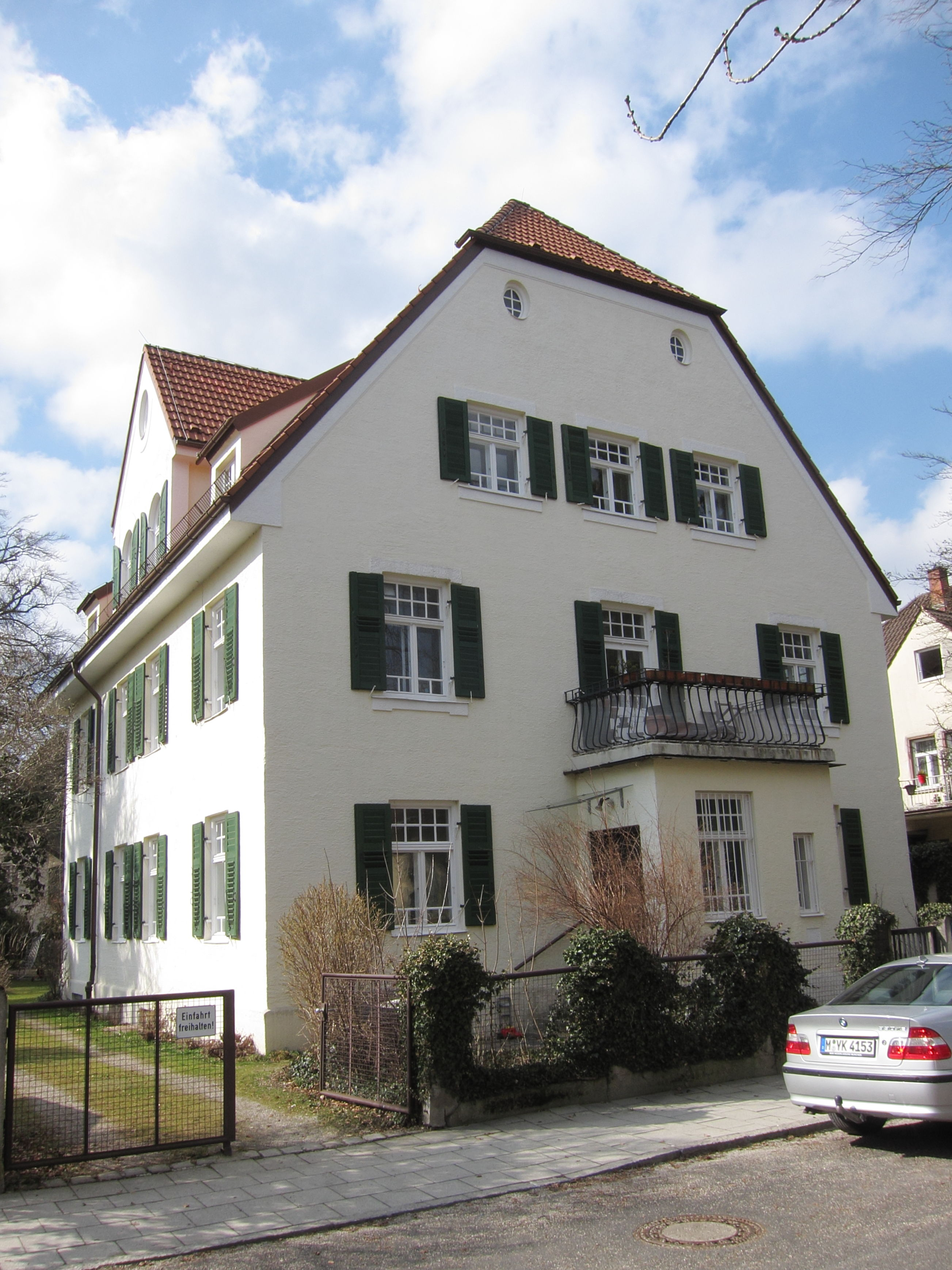 Fritz-Reuter-Straße 19a; Villa, Heimatstil, 1910 von Ulrich Merk.